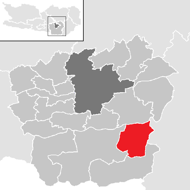 Bezirk Klagenfurt-Land